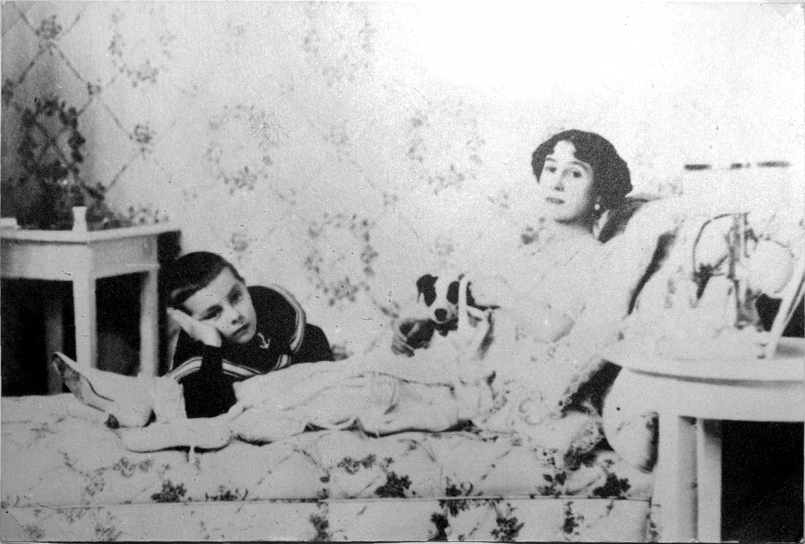 Мати́льда Фе́ликсовна Кшеси́нская (балерина. Родилась 19 (31) августа, по старому стилю 1 сентября 1872 в Лигово (под Петербургом) в семье артистов балета Мариинского театра. Умерла 6 декабря 1971 года в Париже) готовится к спектаклю в своём особняке.